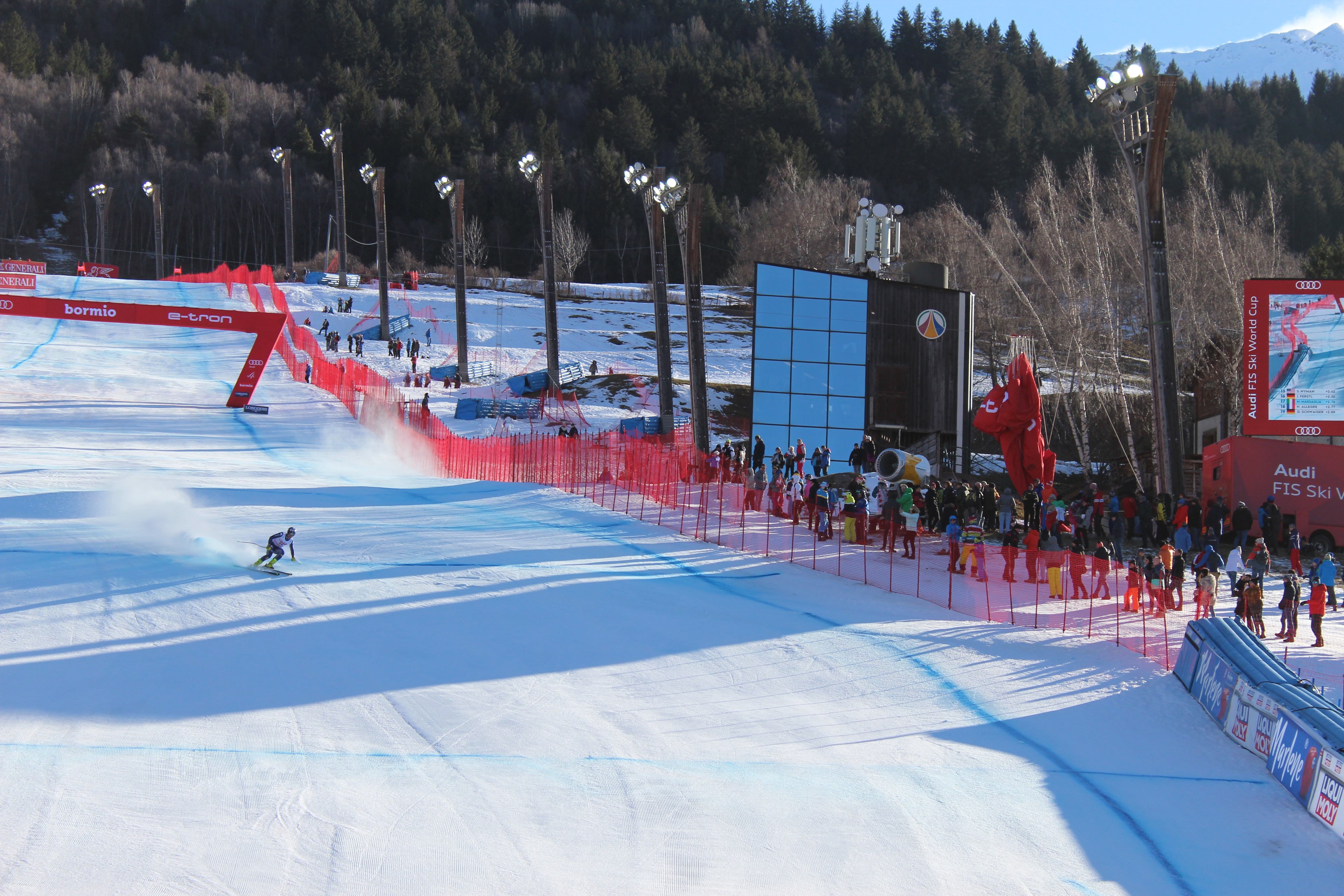 Lo sciatore Matteo Marsaglia al traguardo della Pista Stelvio di Bormio, durante la discesa libera del 28 dicembre 2019, valida per la Coppa del Mondo di sci 2019-2020.